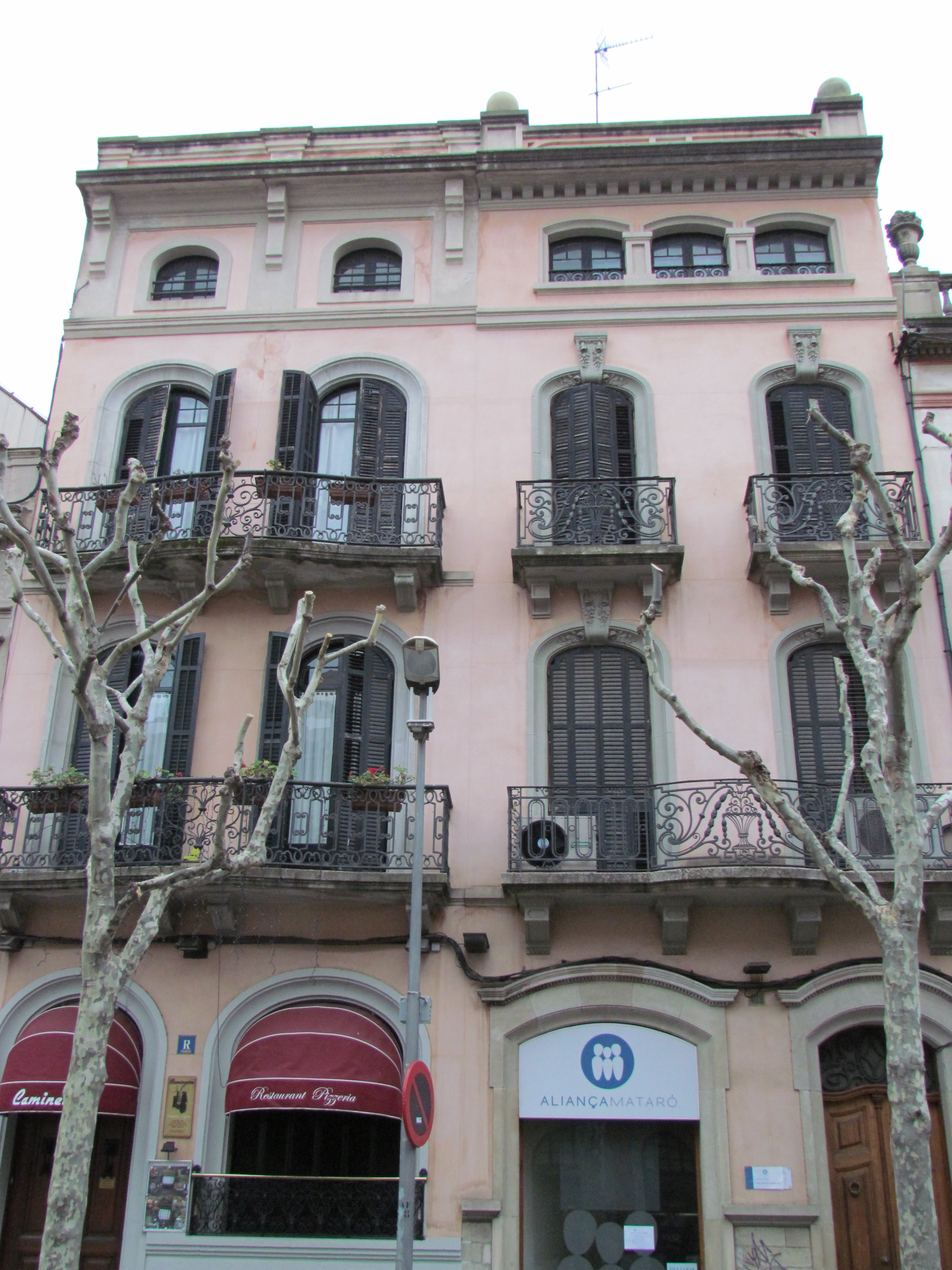 Vista de la Façana de Can Cusachs. (Mataró, el Maresme)